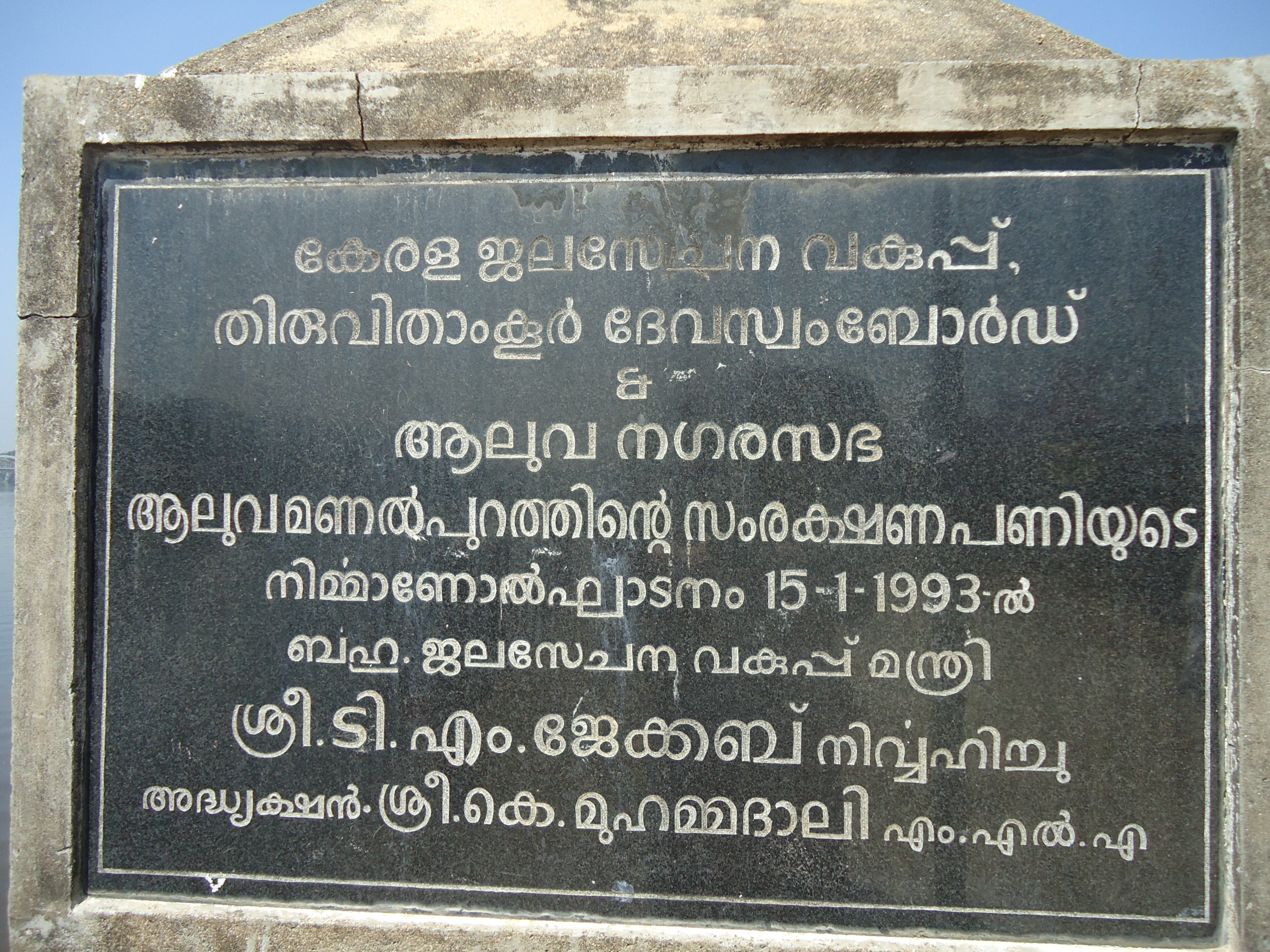 Aluva Manappuram Stone Board Detail